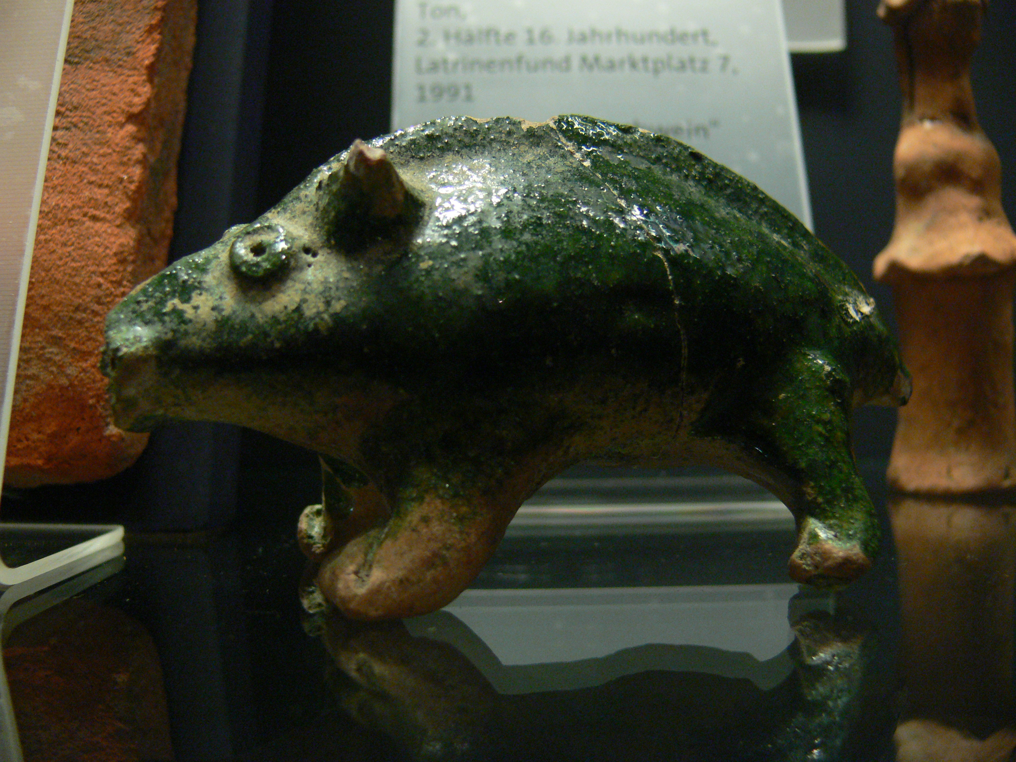 Biberach an der Riß, Braith-Mali-Museum Spardose (Sparschwein), Ton, Biberach, 2. Hälfte 16. Jh., aufgrund der geringen Größe wohl eher als Glücksbringer gedacht. Latrinenfund, Marktplatz 7, 1991 (Leihgabe des Landesdenkmalamts Baden-Württemberg)